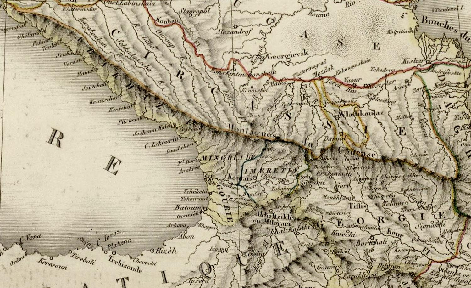 Carte de La Russie D'Europe avec ses nouvelles acquisitions sur la Suede, la Pologne, et le Caucase. Par L. Vivien Geographe. 1824. Grave par Giraldon Bovinet. A Paris. Chez Menard et Desenne, Rue Git le Coeur, No. 8. 2eme Feuille.